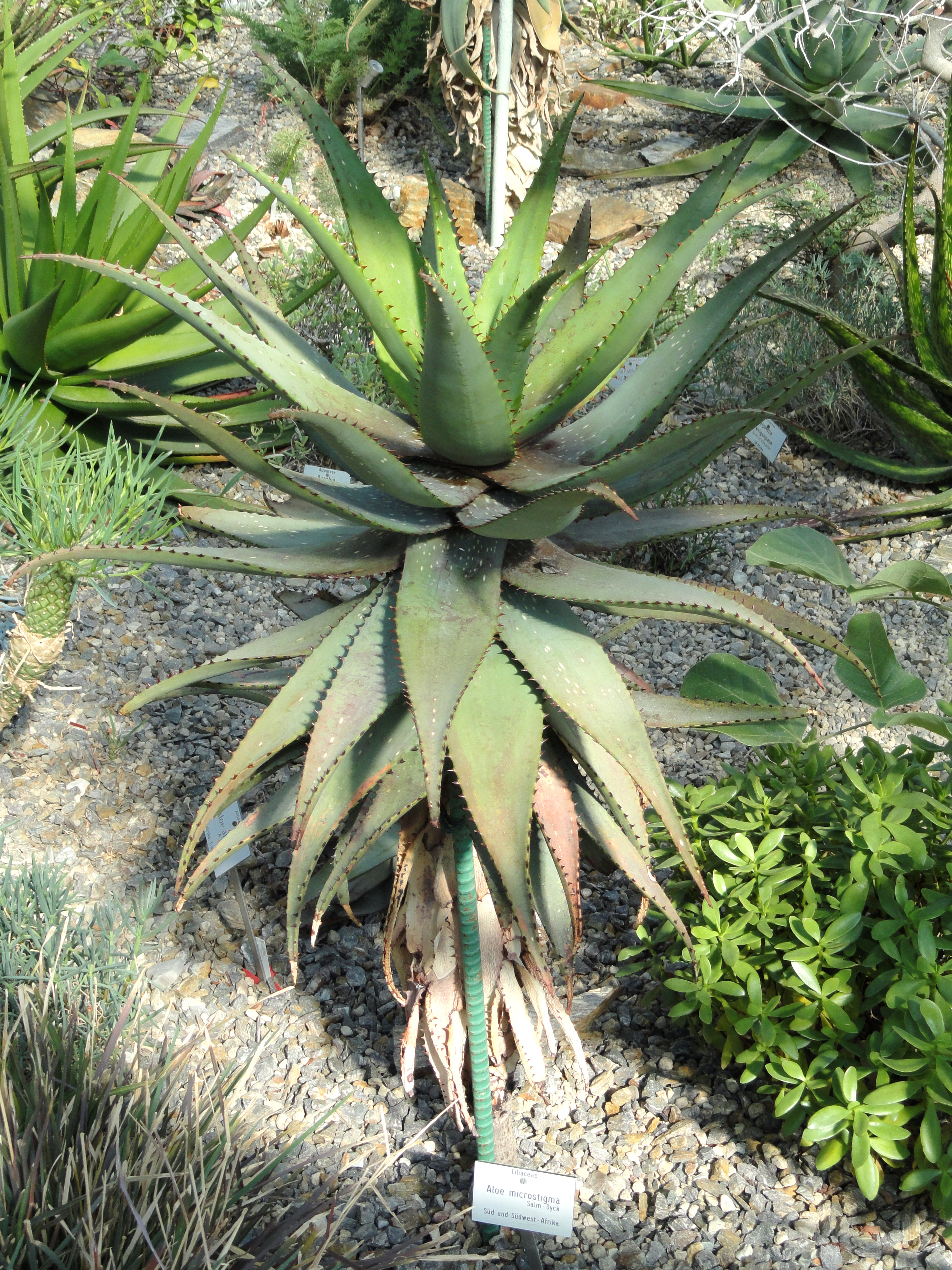 Aloe microstigma specimen in the Botanischer Garten München-Nymphenburg, Munich, Germany.